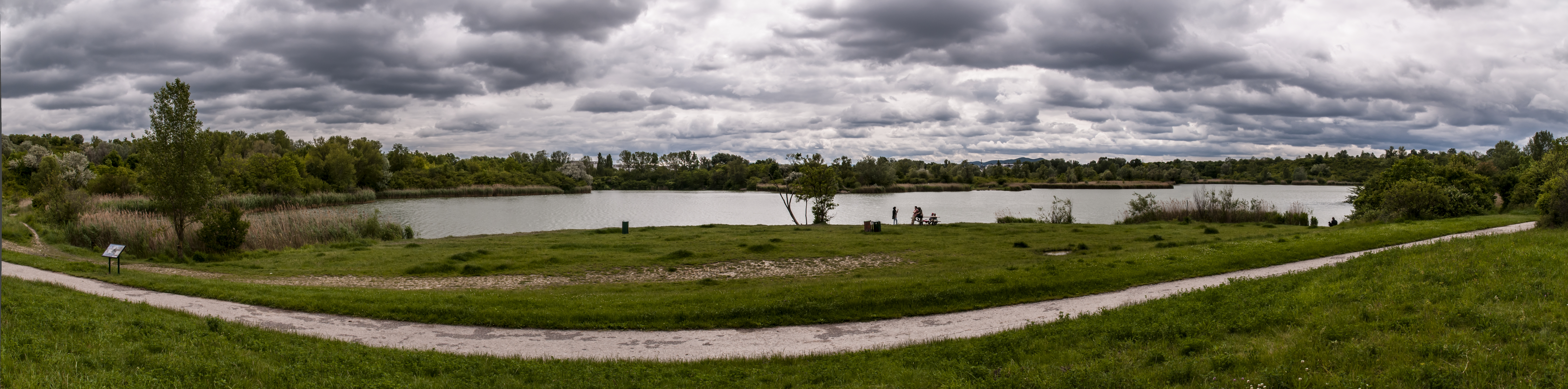 Wienerberg Teich-Panorama This media shows the Geschützter Landschaftsteil in Vienna with the ID 9056.